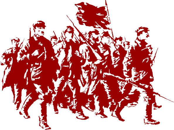 Для шаблона о Красной армии